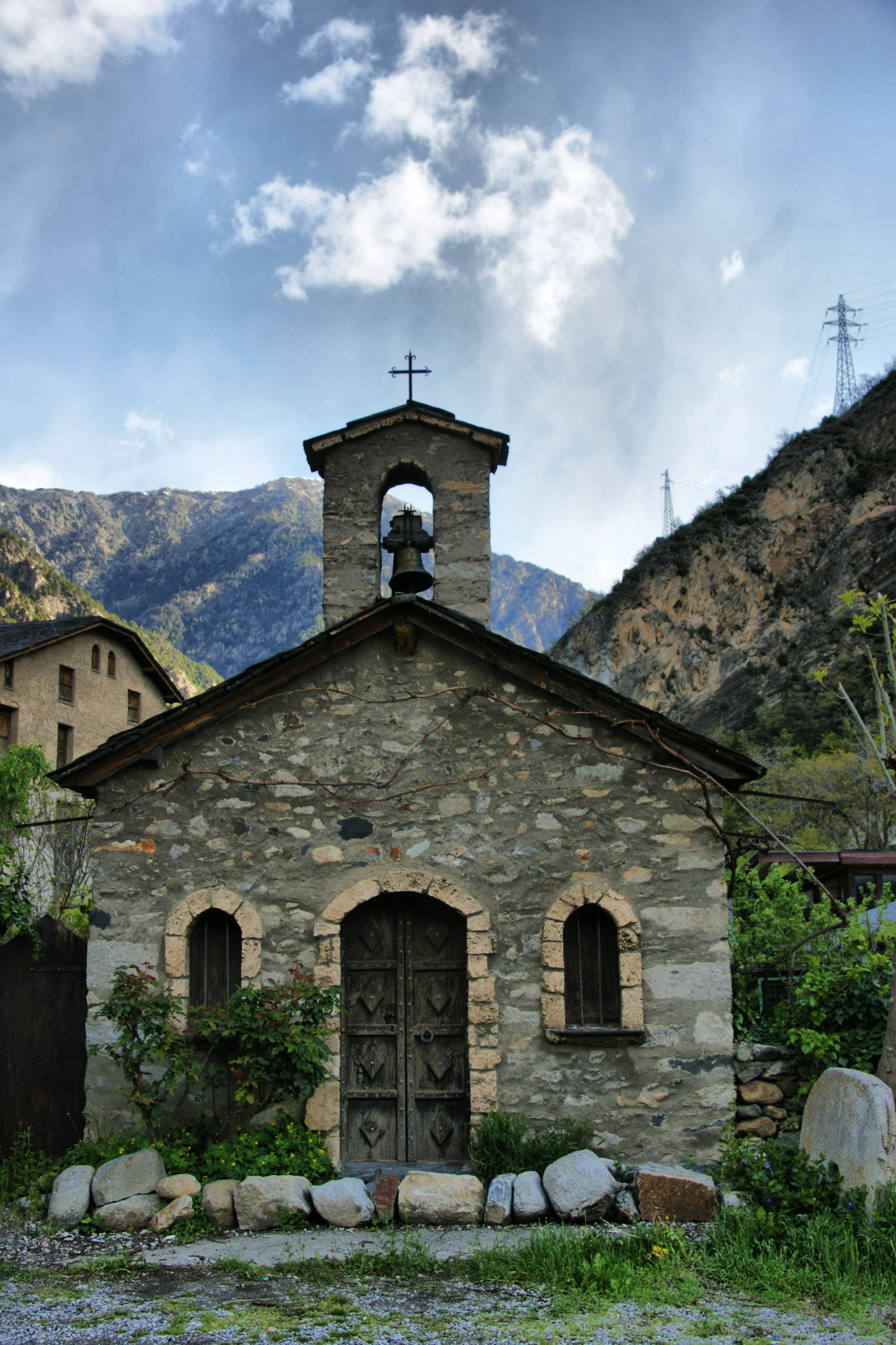 no hi ha descripció